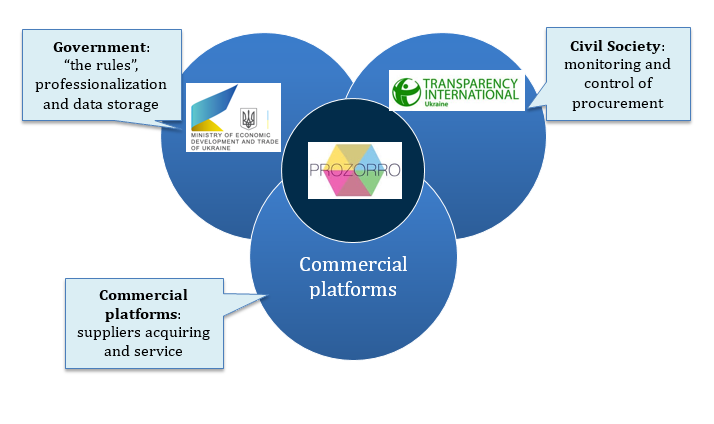 Золотий трикутник партнерства